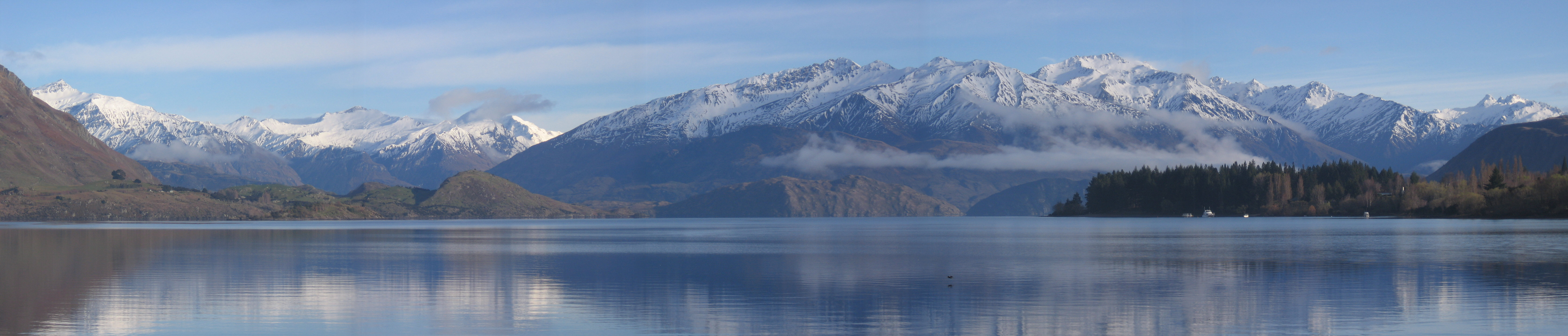 View of Lake Wanaka, New Zealand